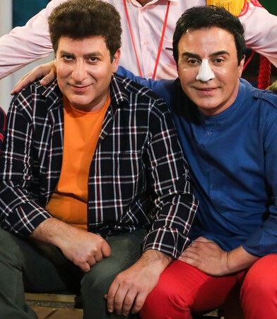 رامین ناصر نصیر و داریوش فرضیایی در بچه محل